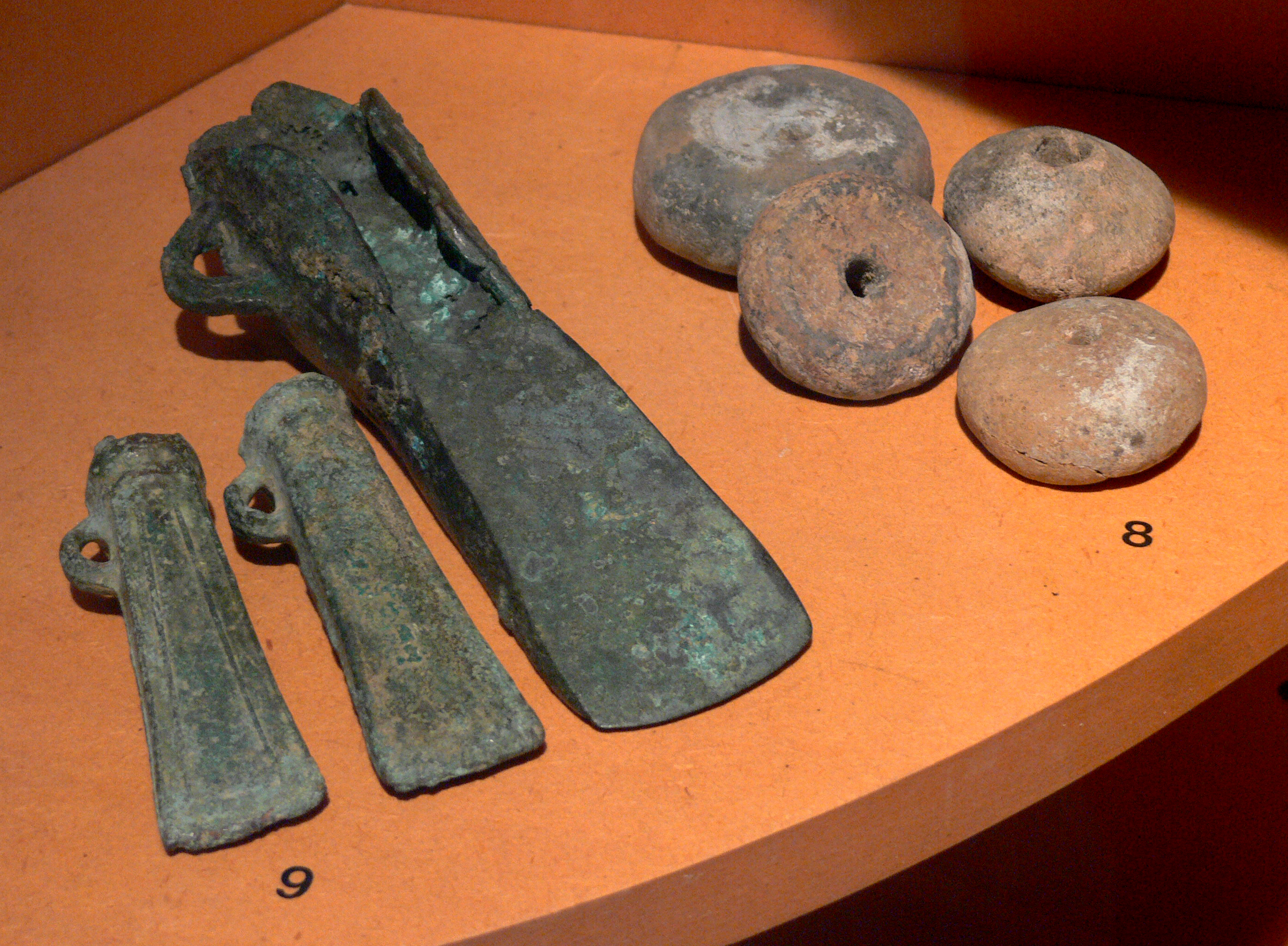 Fusaïoles (8) et haches de bronze (9) trouvées dans la grotte de Champdamoy (Quincey, Haute-Saône) : gisement archéologique de l'âge du bronze et du premier âge du fer (Hallstatt). Vesoul, Musée Georges-Garret.